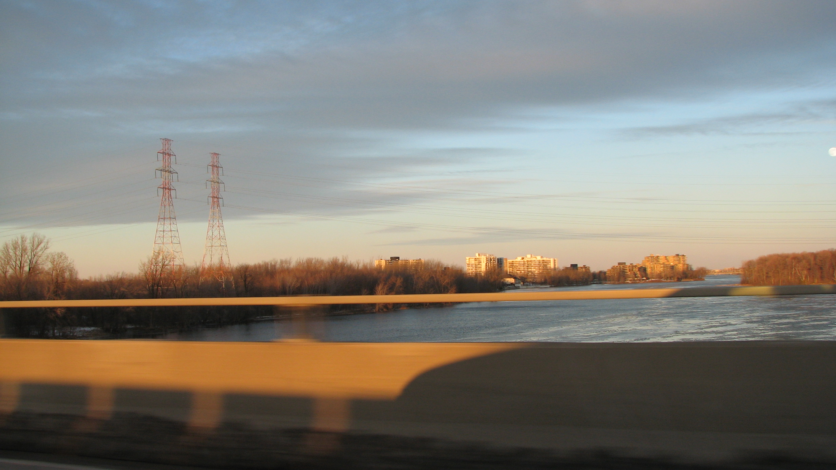 Photo prise de l'autoroute 13 en direction nord, de la Rivière des Prairies.